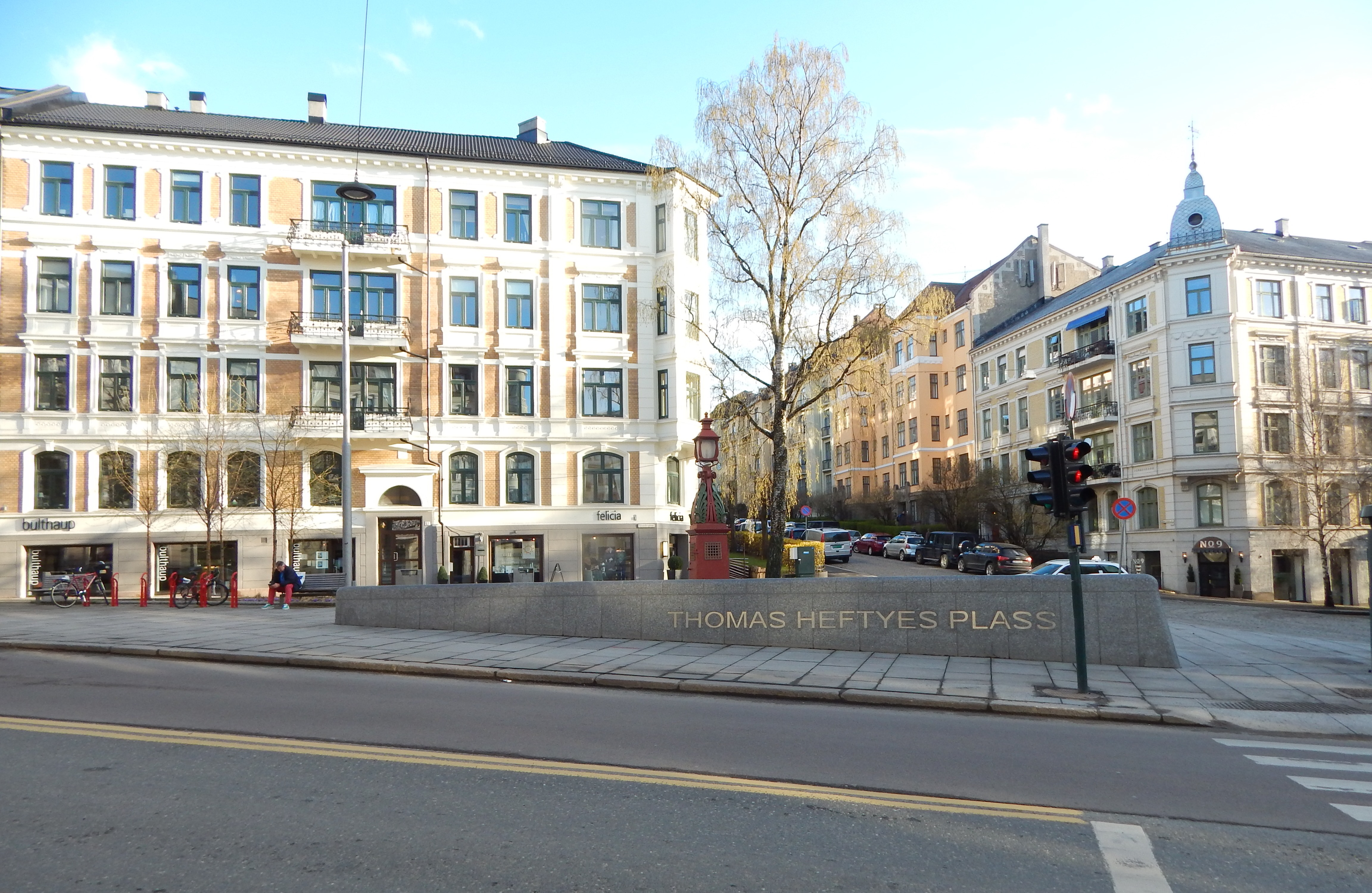 Thomas Heftyes plass